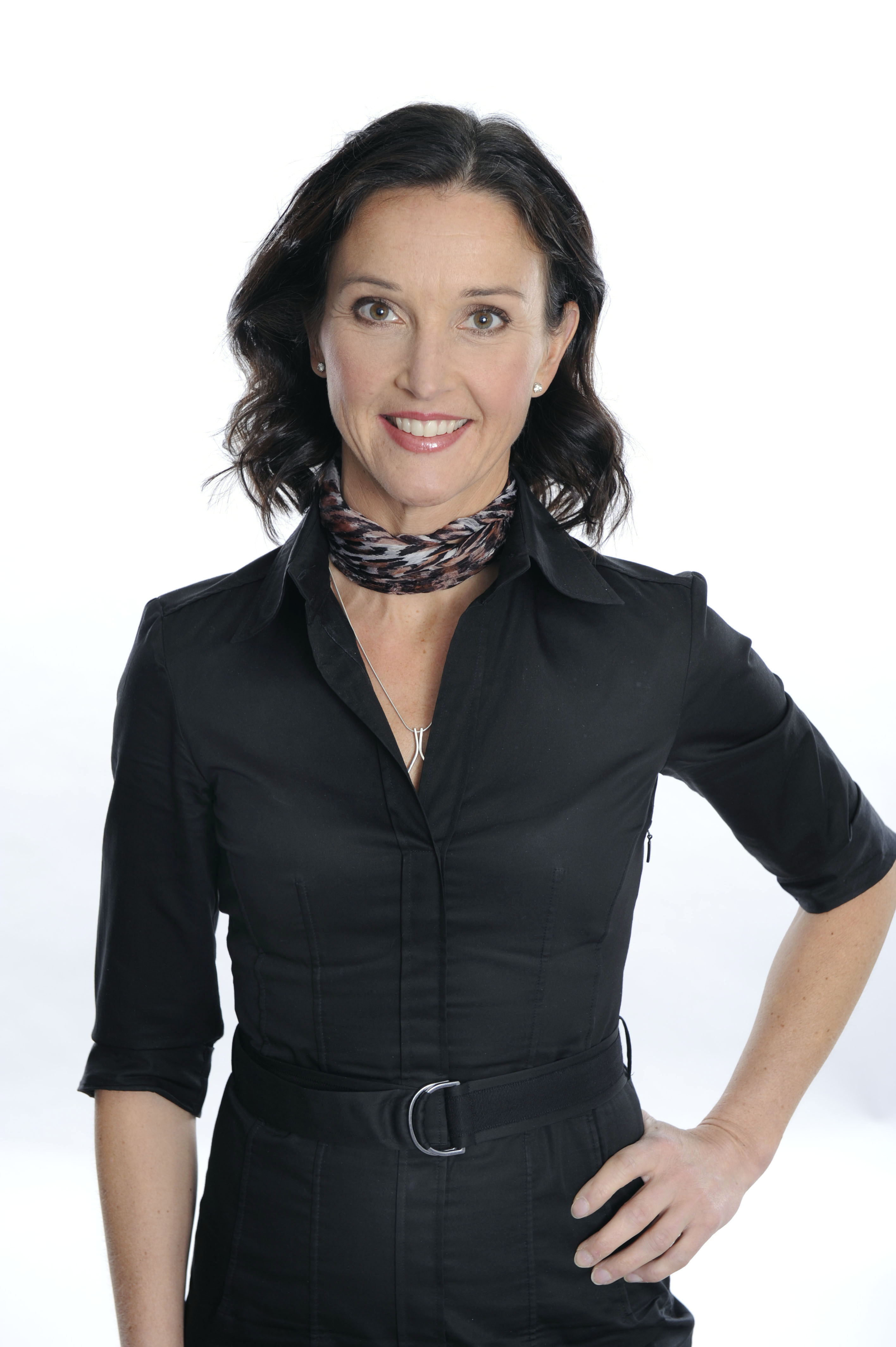 SVT:s meteorolog Pia Hultgren.